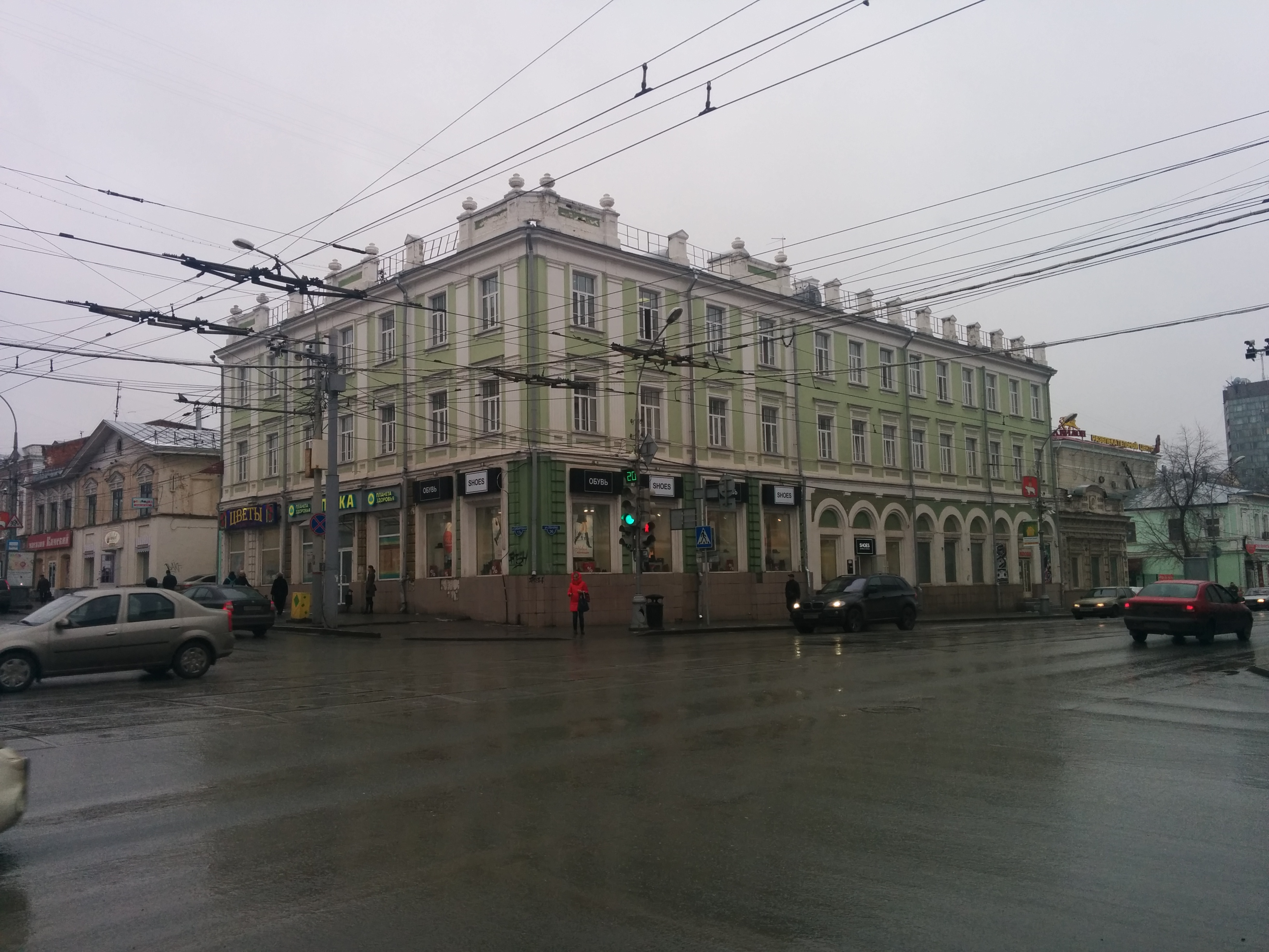 Дом Н.Д. Базанова: ул. Ленина, 36, Пермь, Пермский край